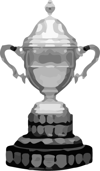 Gráfico del trofeo del Campeonato Uruguayo de Primera División. Esta copa, donada por Aníbal Z. Falco en 1937 es la 4ta en la historia de la Primera División Uruguaya, sin derecho a posesión definitiva. Las anteriores copas habían sido otorgadas en forma definitiva a los equipos que ganaron 3 campeonatos consecutivos, a saber, Nacional (1917 y 1924), y Peñarol (1936).